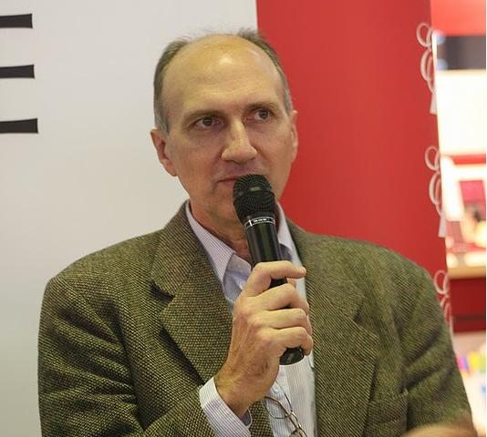 Poetul Ion Bogdan Lefter la o lansare de carte